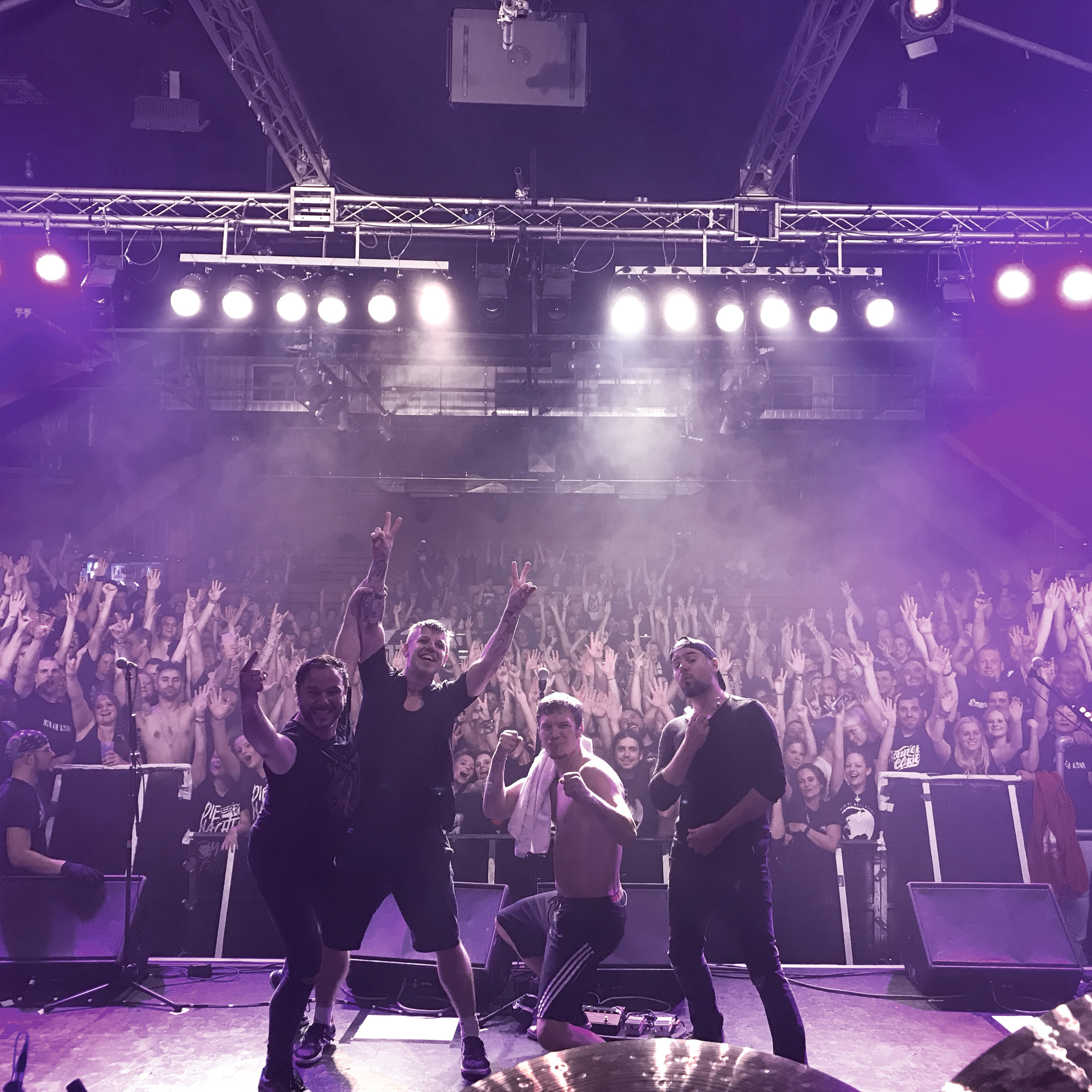 Hamburg - Markthalle 2017 Live Der Tag mein Feind Tour